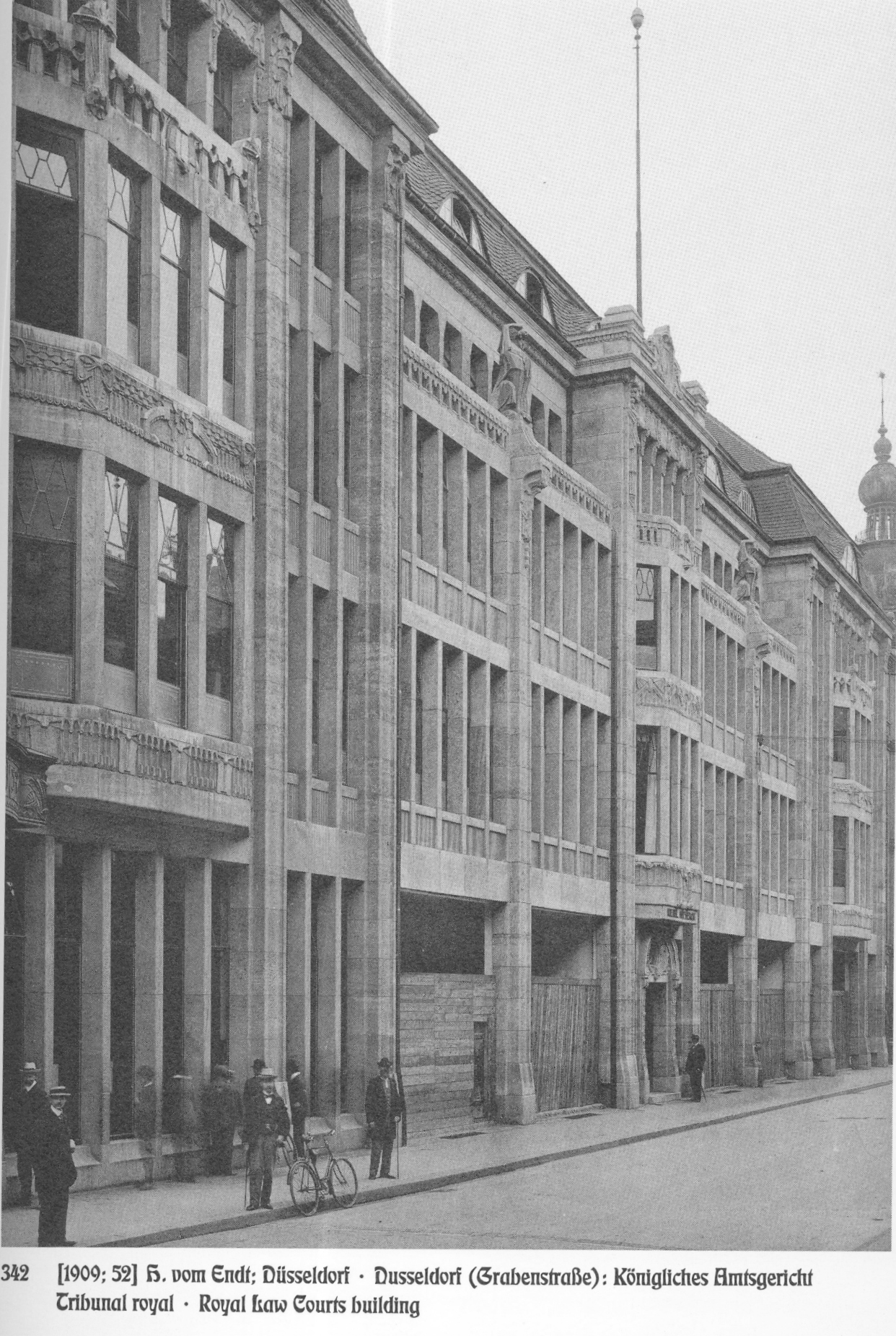 Königliches Amtsgericht, im damalig befindlichen Flügel des Girardethauses, Grabenstraße 19–25 (heute: Trinkausstraße 7) in Düsseldorf, 1909, Architekt Hermann vom Endt; figürlichen und ornamentale Bildhauerarbeiten an der Fassade wurden von Albert Pehle und H. Stader geschaffen